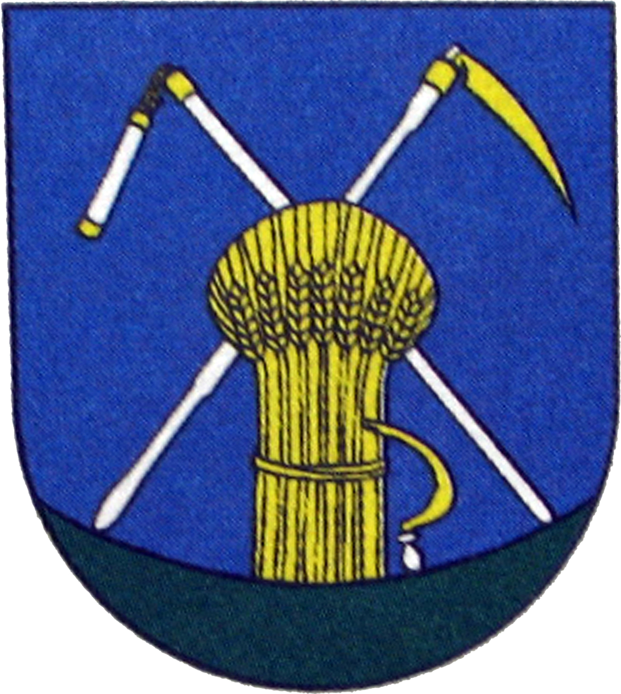 Erb obce Lúčka, okres Svidník